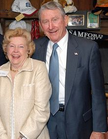 Winfield Dunn and Betty Dunn